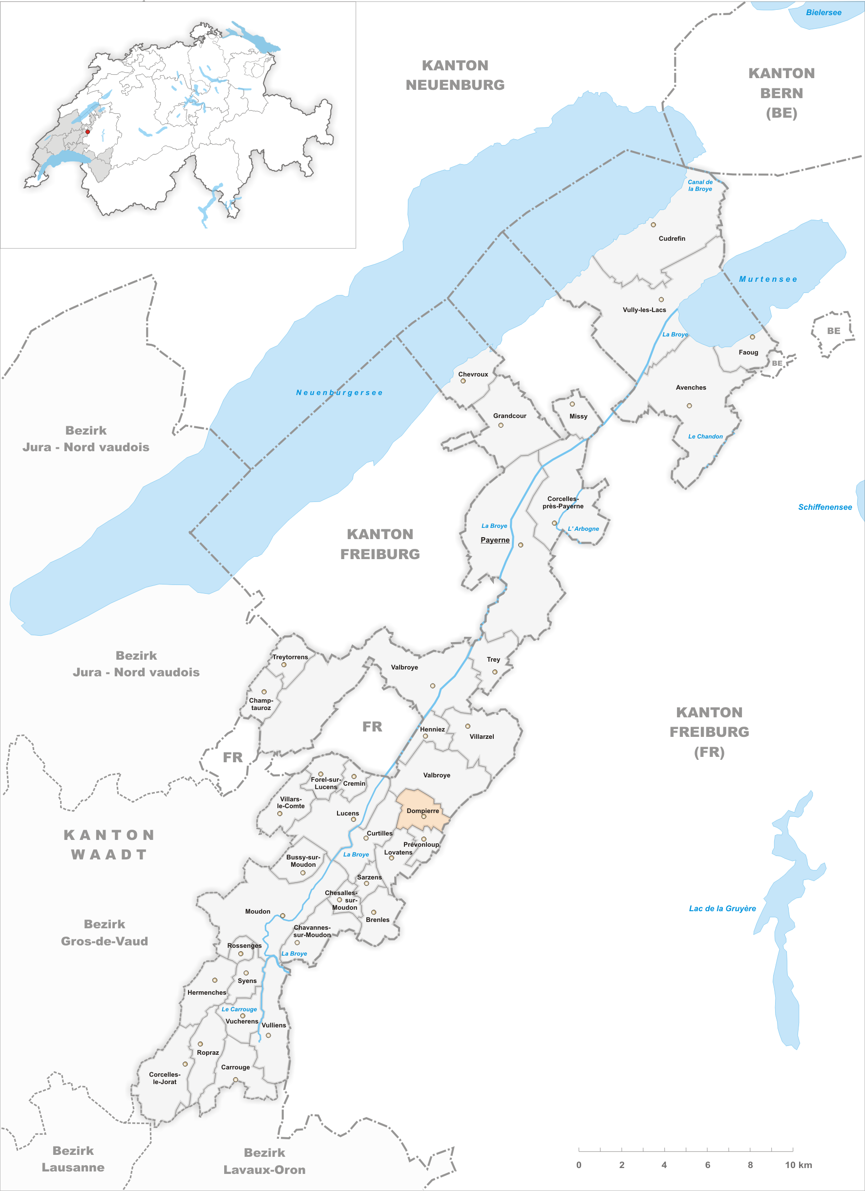 Municipality Dompierre